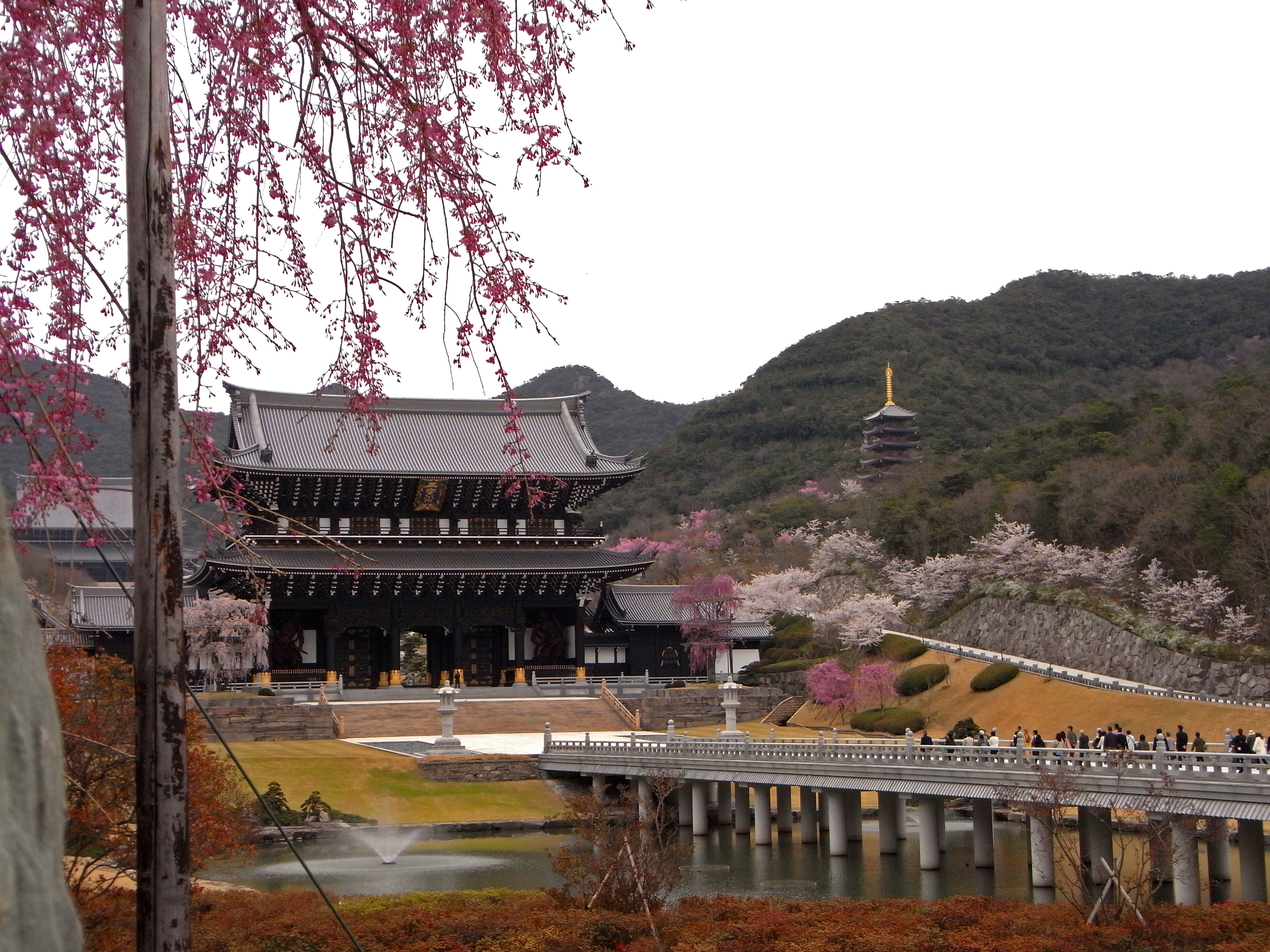 念仏宗(念佛宗)無量寿寺「佛教之王堂」桜と山門と真如橋